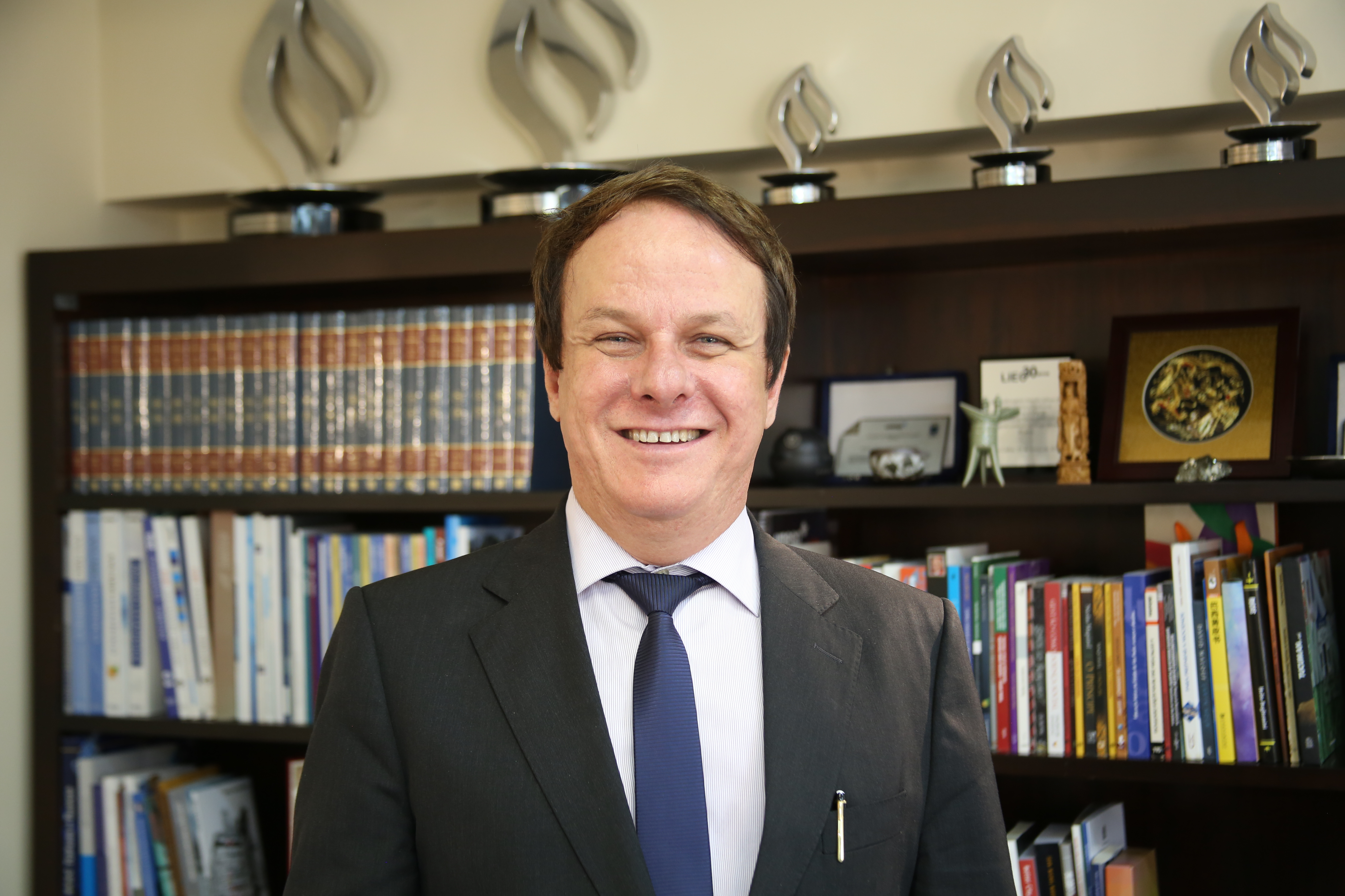 Sandro Roberto Valentini, reitor da Unesp